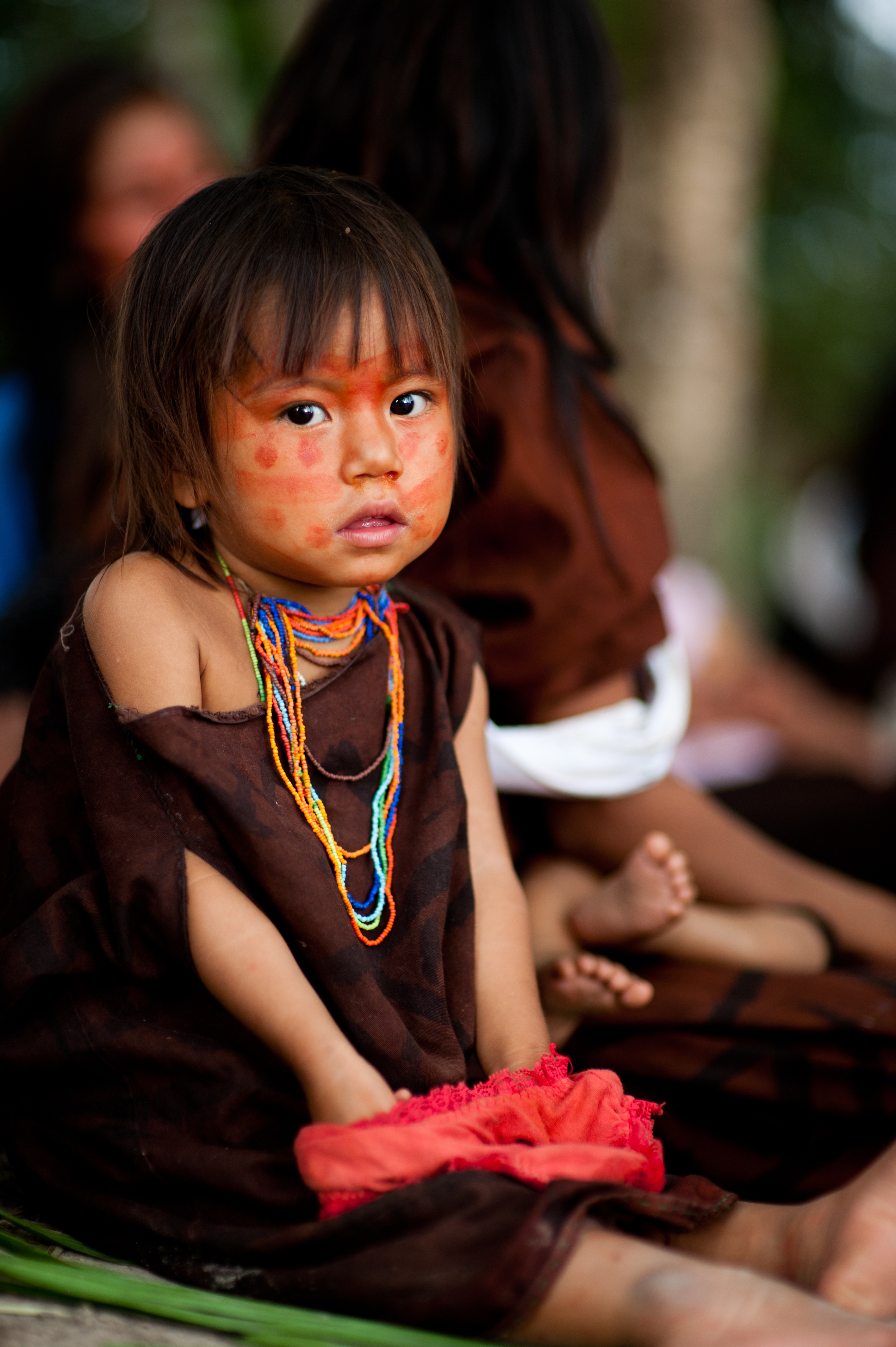 Indígena Ashaninka Aldeia Apiwtxa Acre, Brasil © Pedro França/MinC